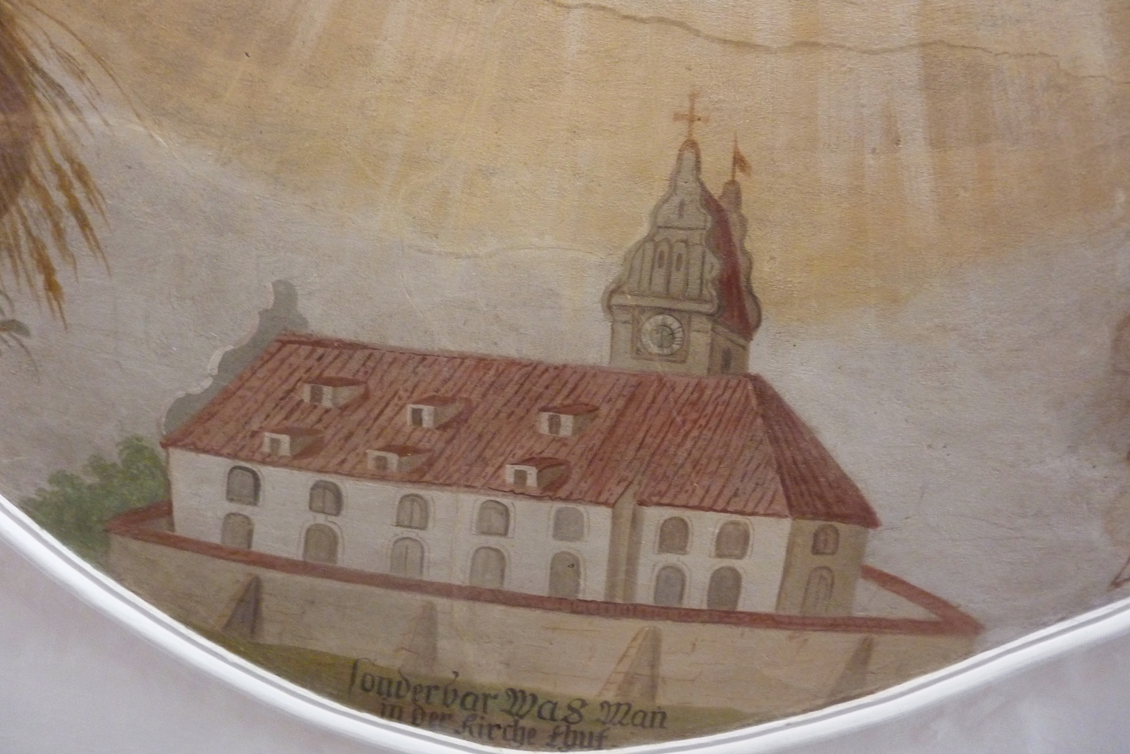 Katholische Pfarrkirche St. Michael in Lutzingen, einer Gemeinde im Landkreis Dillingen an der Donau (Bayern), Bemalung der Unterseite der oberen Empore mit einer alten Ansicht der Kirche und des Turmes mit Wellengiebel, von Joseph Leitkrath, von 1782